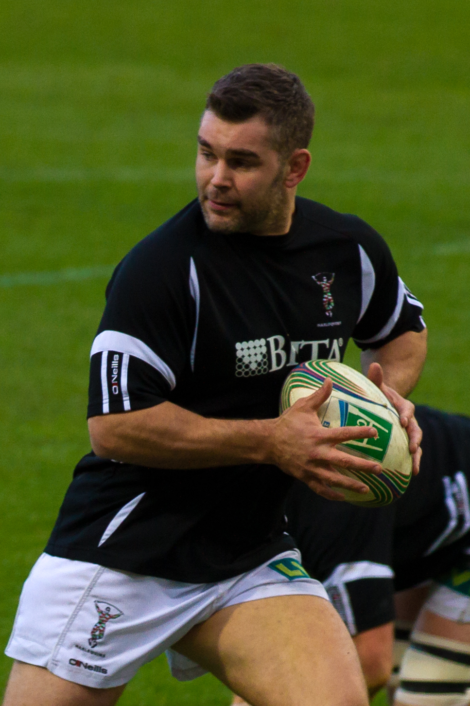 Heineken Cup 2011-2012 — 18 December 2011, Stadium. Match between: Stade toulousain — Harlequin F.C.